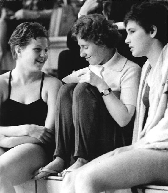 Zentralbild-Gößler Tre-Qu 24.4.1961 Doppelsieg für Ingrid Krämer. Zwei eindrucksvolle Siege feierte Olympiasiegerin Ingrid Krämer beim Internationalen Springertag am 22. und 23.4.1961 in Rostock. UBz. Die wohlverdiente Ruhepause verplaudern Ingrid Krämer mit ihrer Trainerin Siebinski und der Engländerin Ferris (vl.n.r.)